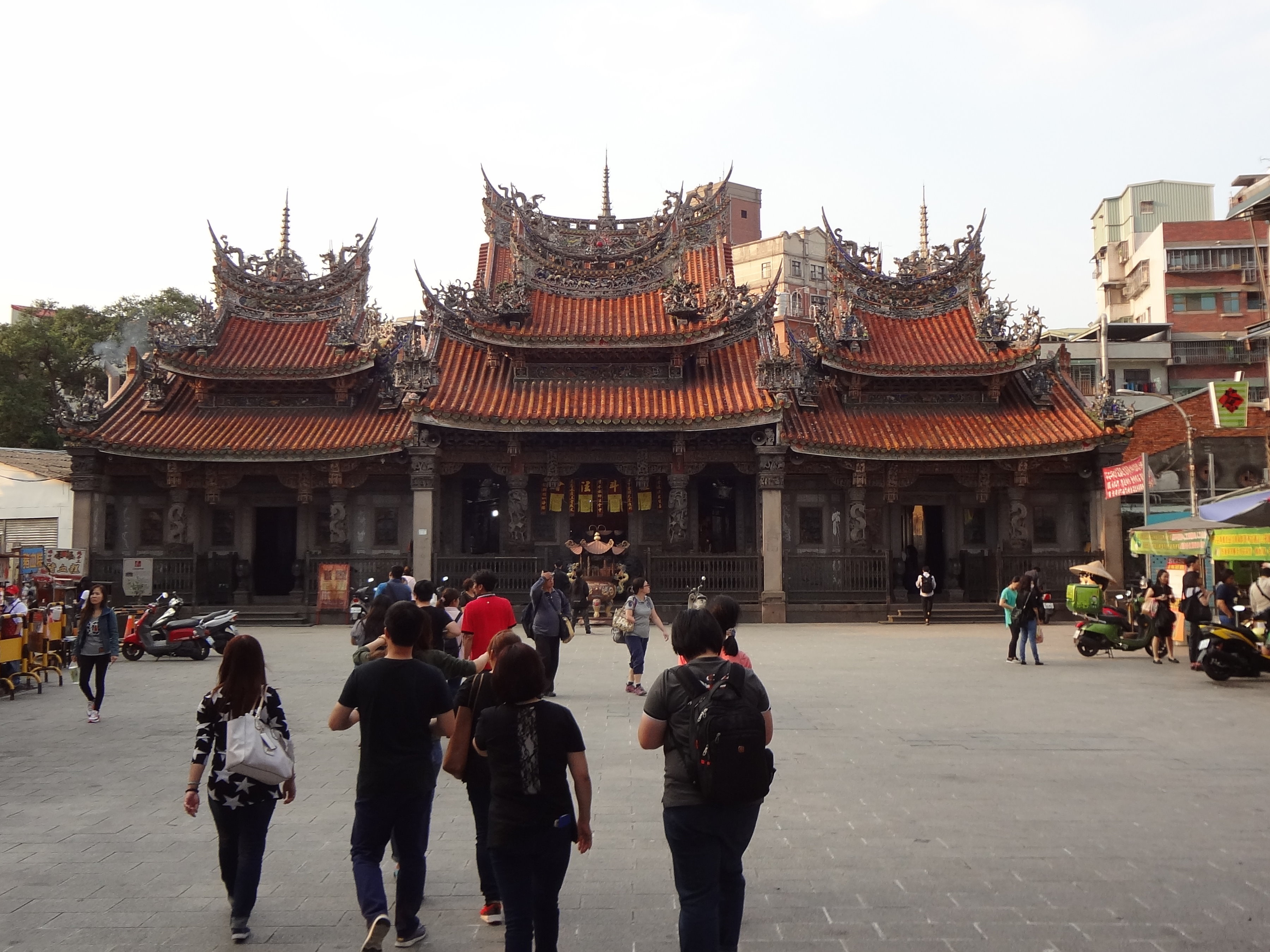 三峽祖師廟，位於新北市三峽區長福街1號。